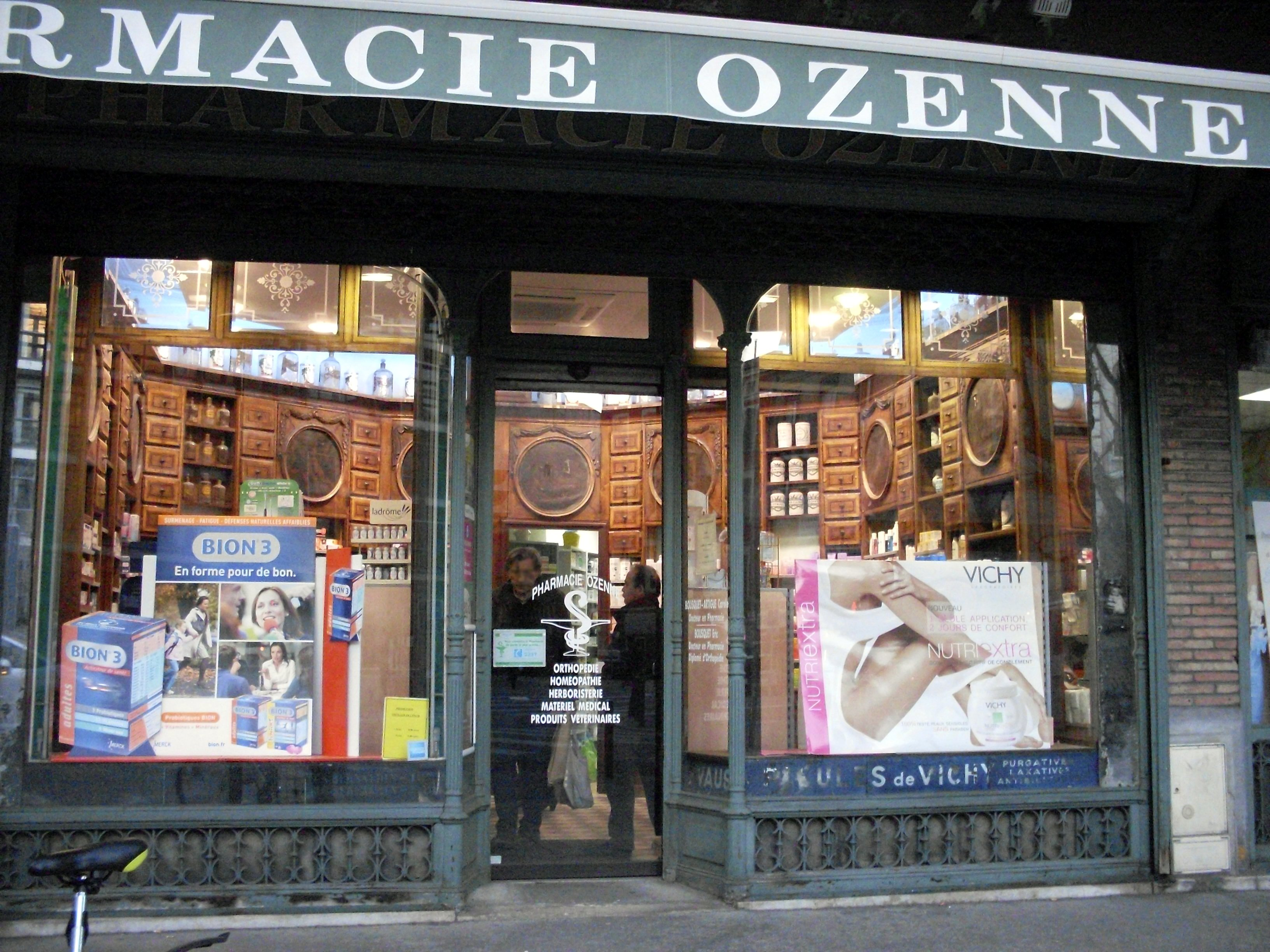 Pharmacie avec marqueterie aux tiroirs numérotés datant du XVIIIe siècle, 3 rue Ozenne, Toulouse.